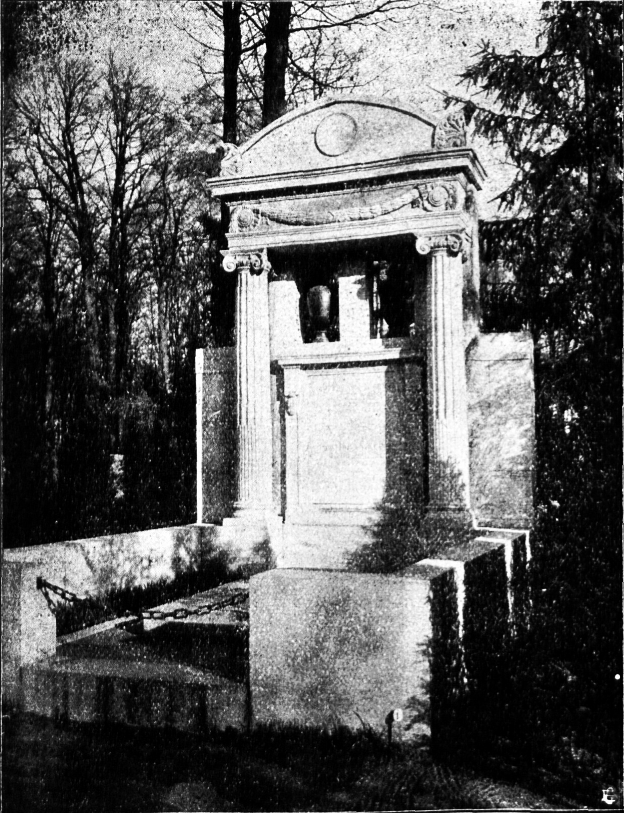 Grab der Familie v. Großheim. Hier hatte der Architekt in Erster Linie im Abwegen von Horizontalen und Vertikalen einen, wie es hieß, vornehm heiteren Bau hingestellt, welcher doch des würdevollen Ernstes nicht entbehre. Die reich kannelierten Säulen, die kräftig umrahmte Namenstafel widerstrebt nicht der wuchtigen, scharfkantigen Umfassungsmauer um den schlichten Grabstein und der eckig gegliederten Schlußkette. Das harmonische Spiel der Lichter und Schatten leide aber unter dem Umstand, dass zwei Urnen, gefällig von Form und Tönung, in oberen Teil des Aufbaues in völlig durchbrochenen Nischen stehen. Heute wirken sie weniger unruhig, da die Tujen sie von hinten her halbwegs umschließen.